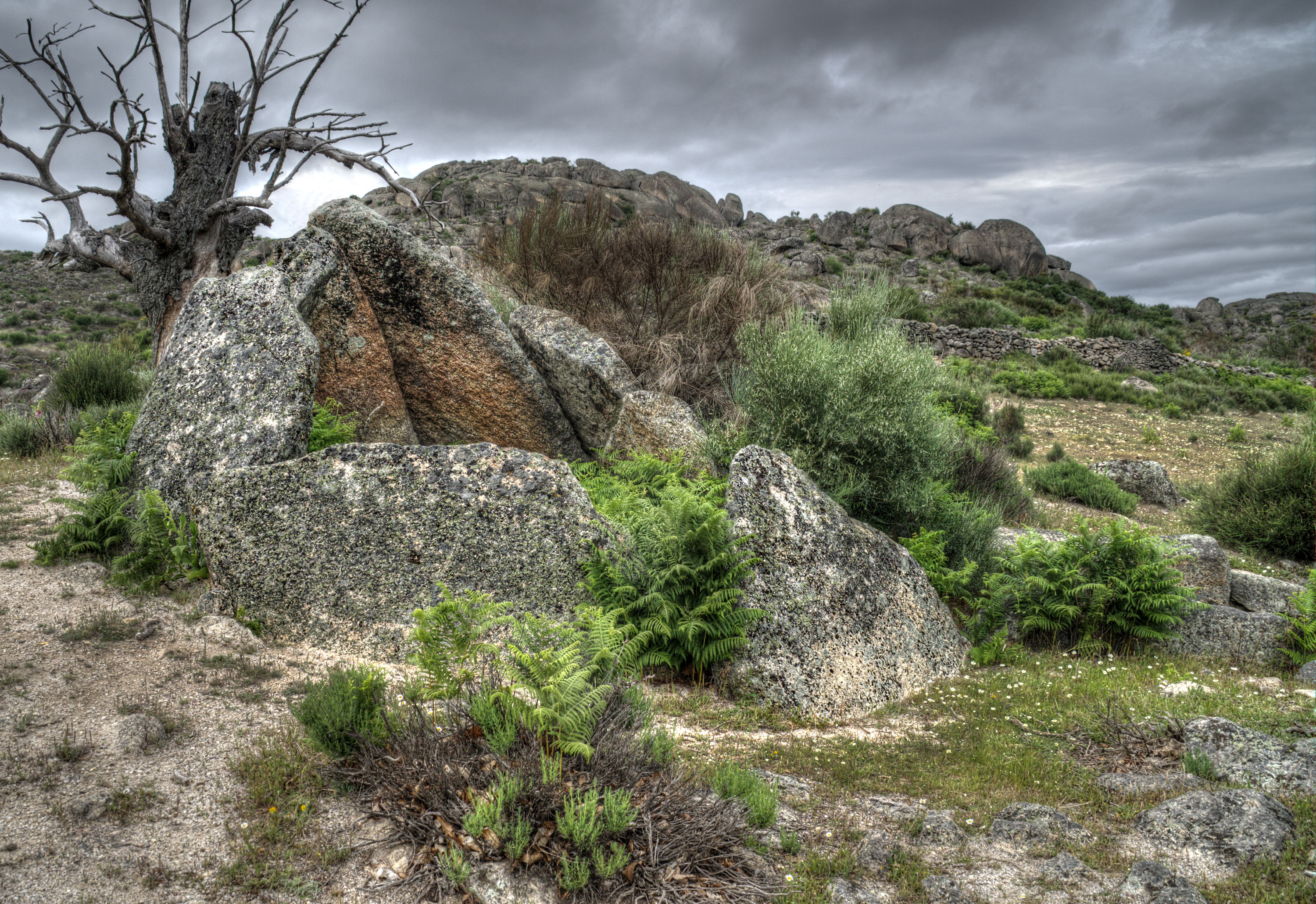 Dolmen de granito con cámara y un corredor corto. Cronología: IV-III milenio. Situado en las cercanías de La Aceña de la Borrega, Cáceres.